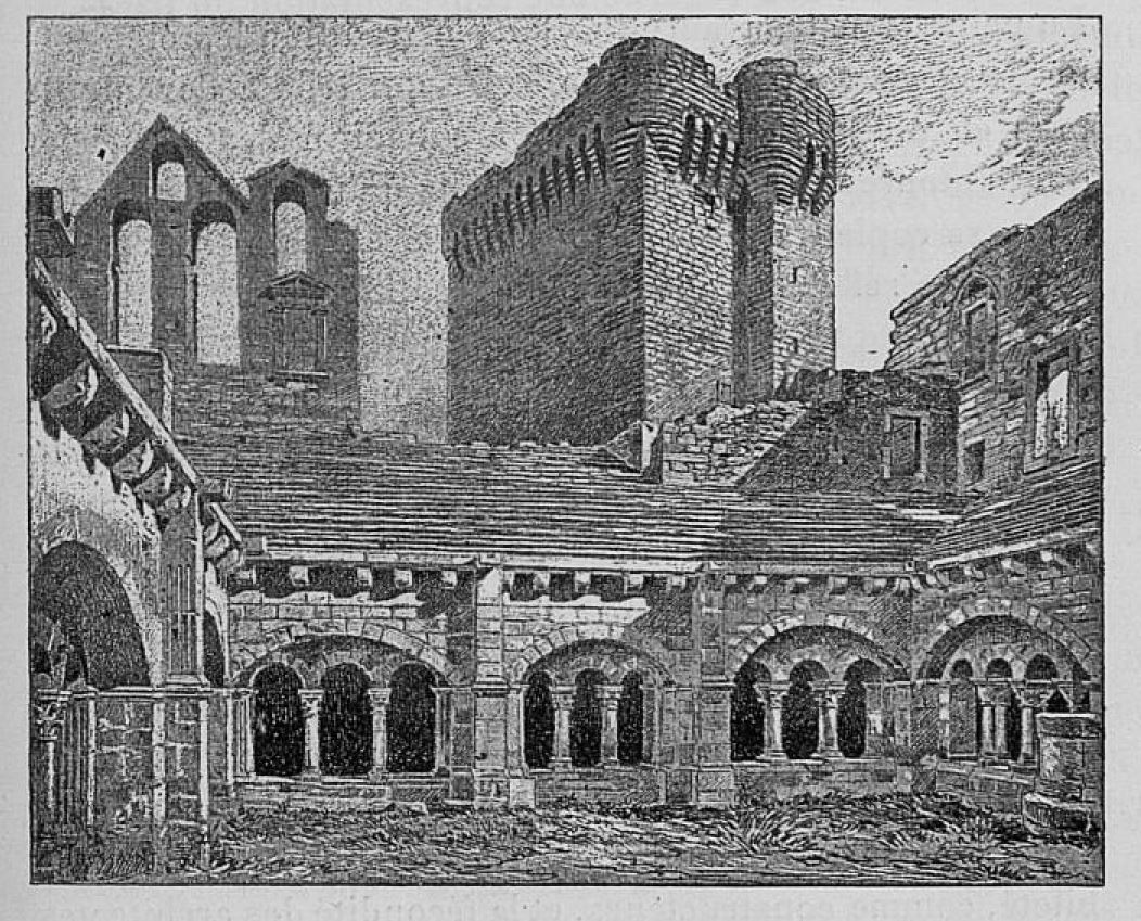 Cloître roman, abbaye de Montmajour in Les arts de l'ameublement. Les styles par Henry Havard, C. Delagrave (Paris) 1891-1897